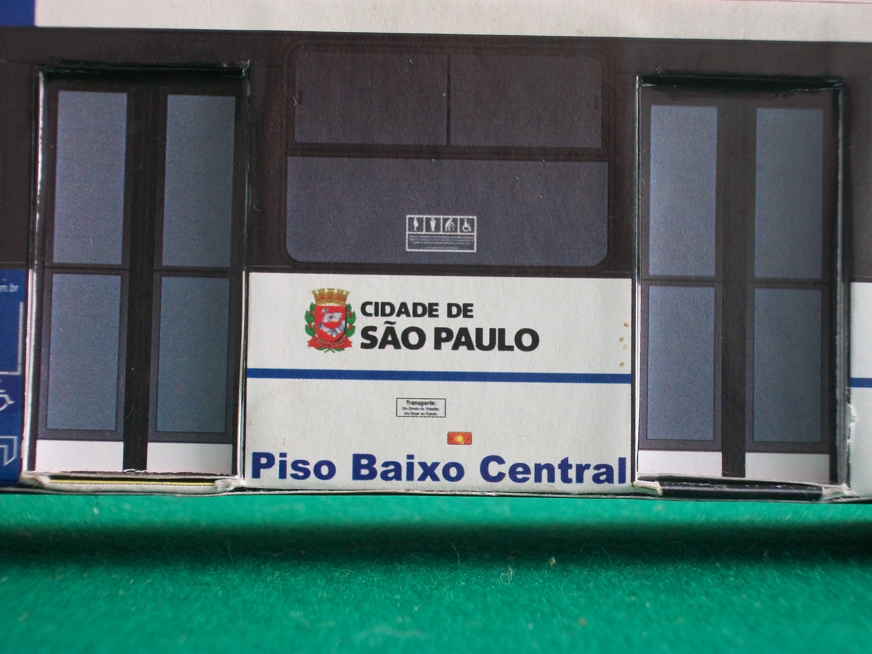 Caio Millennium II, piso baixo central, acessibilidade, pertencente à empresa Sambaíba, de São Paulo - SP. Descrição externa do chassi desse veículo: piso central rebaixado.